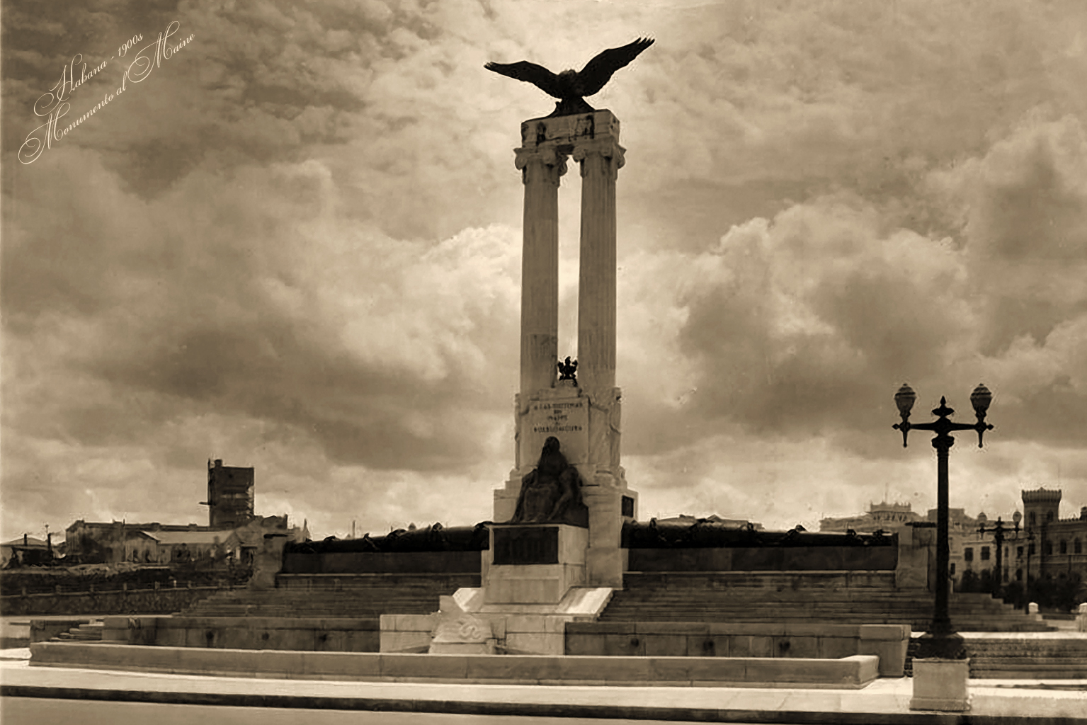 Monumento al Maine, Habana